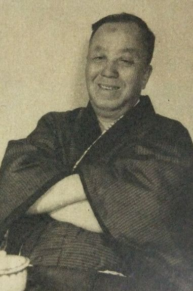 北村徳太郎